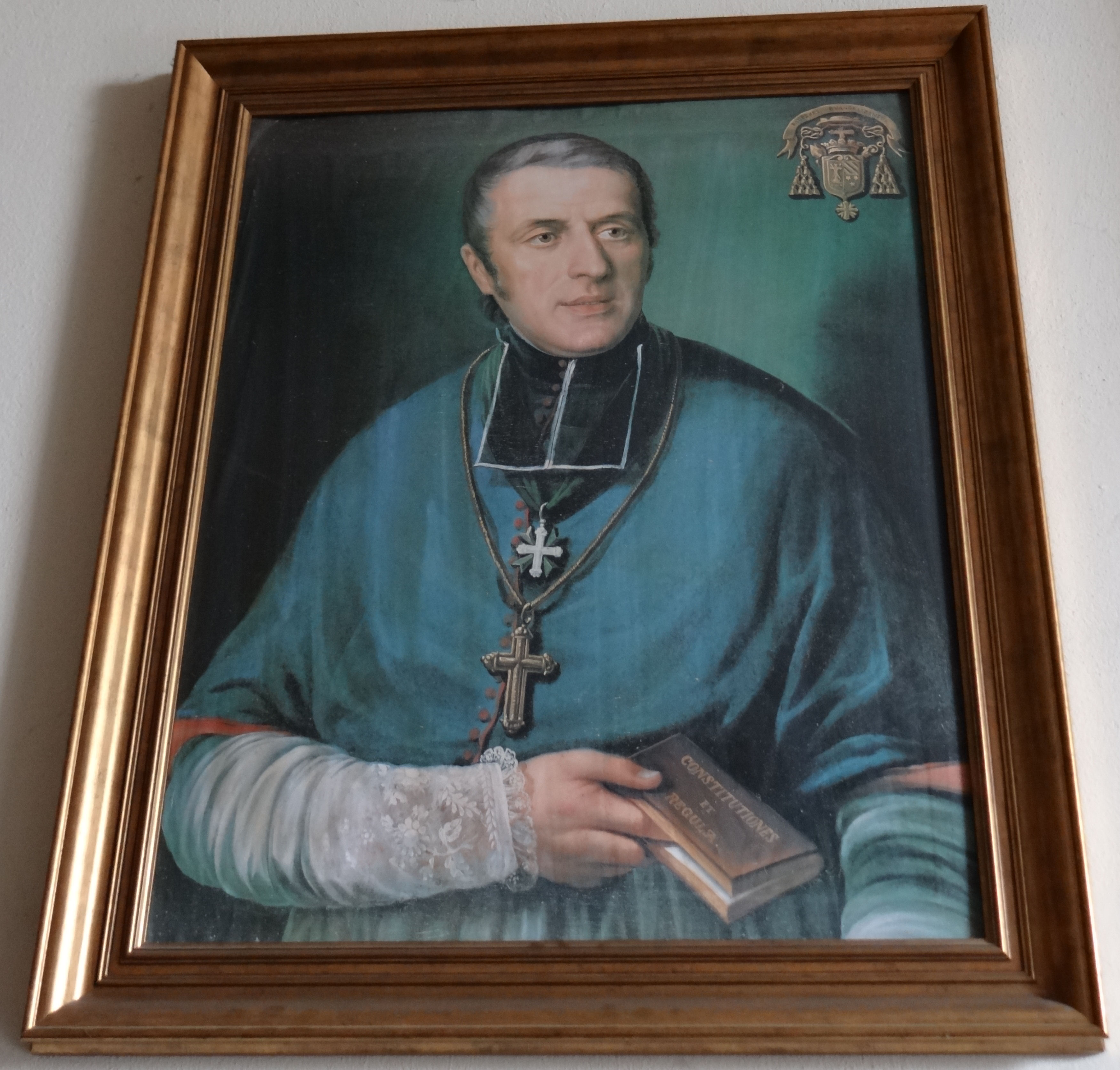 Sanktuarium Relikwii Drzewa Krzyża Świętego - portret Św Eugeniusza de Mazenod - założyciela i generała zakonu Misjonarzy Oblatów Maryi Niepokalanej (OMI)